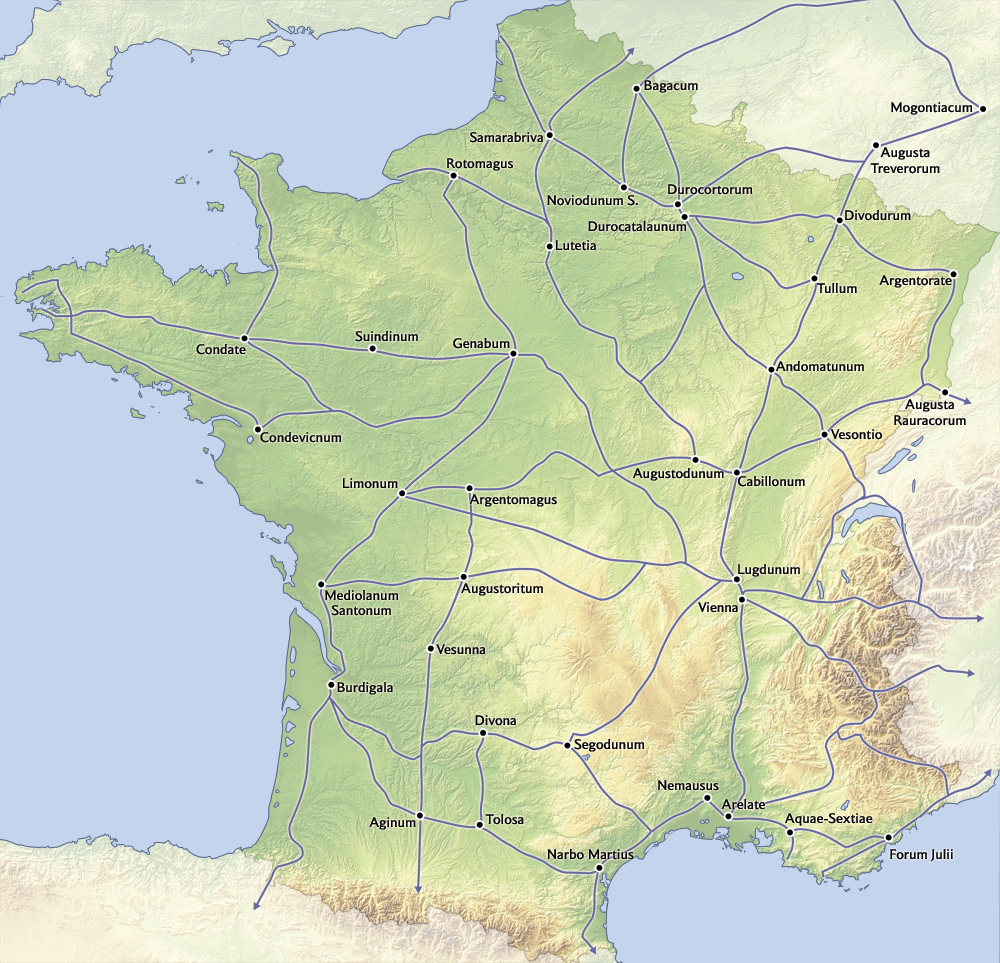 Carte des vois romaines en Gaule